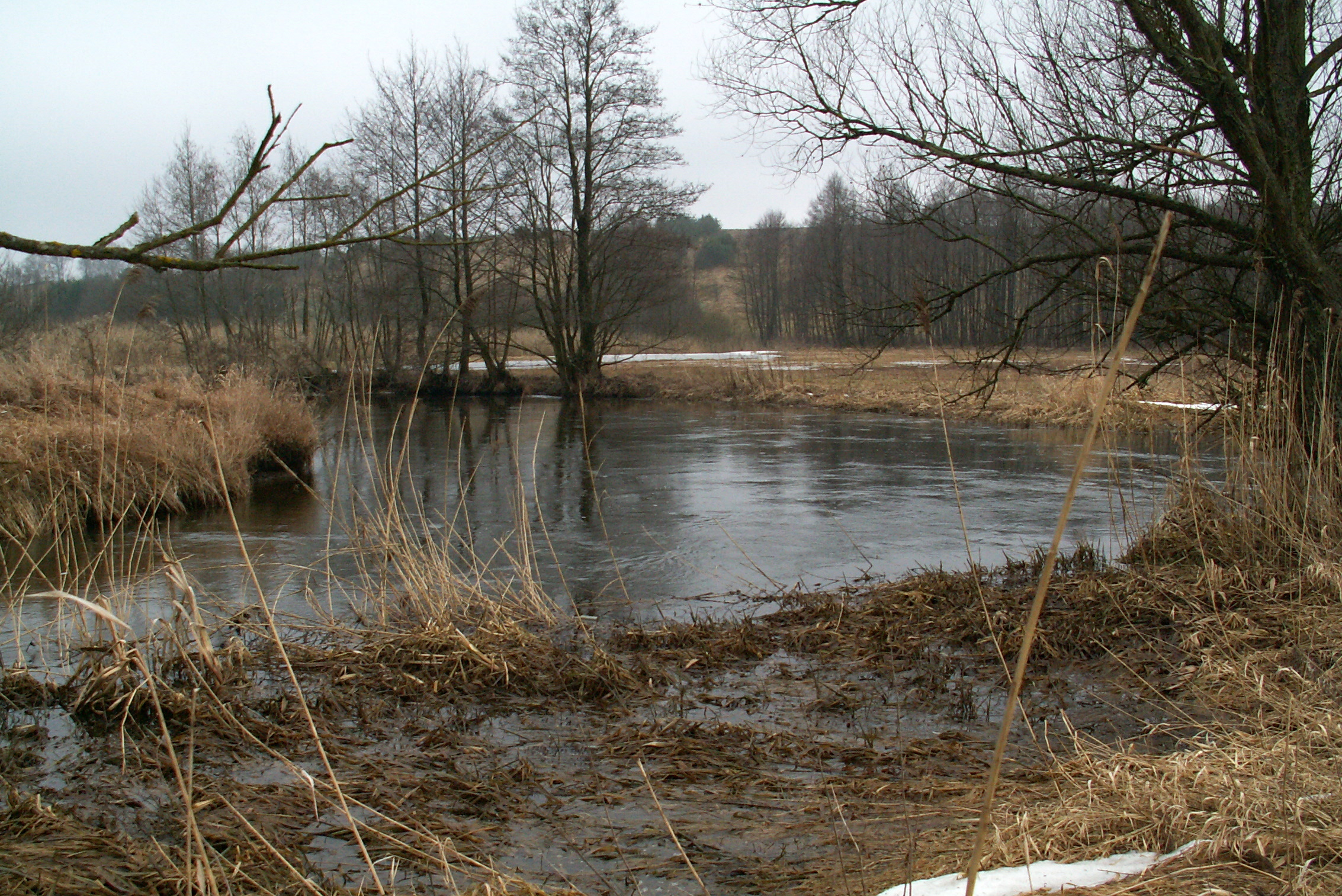 Wietcisa ujscie do Wierzycy